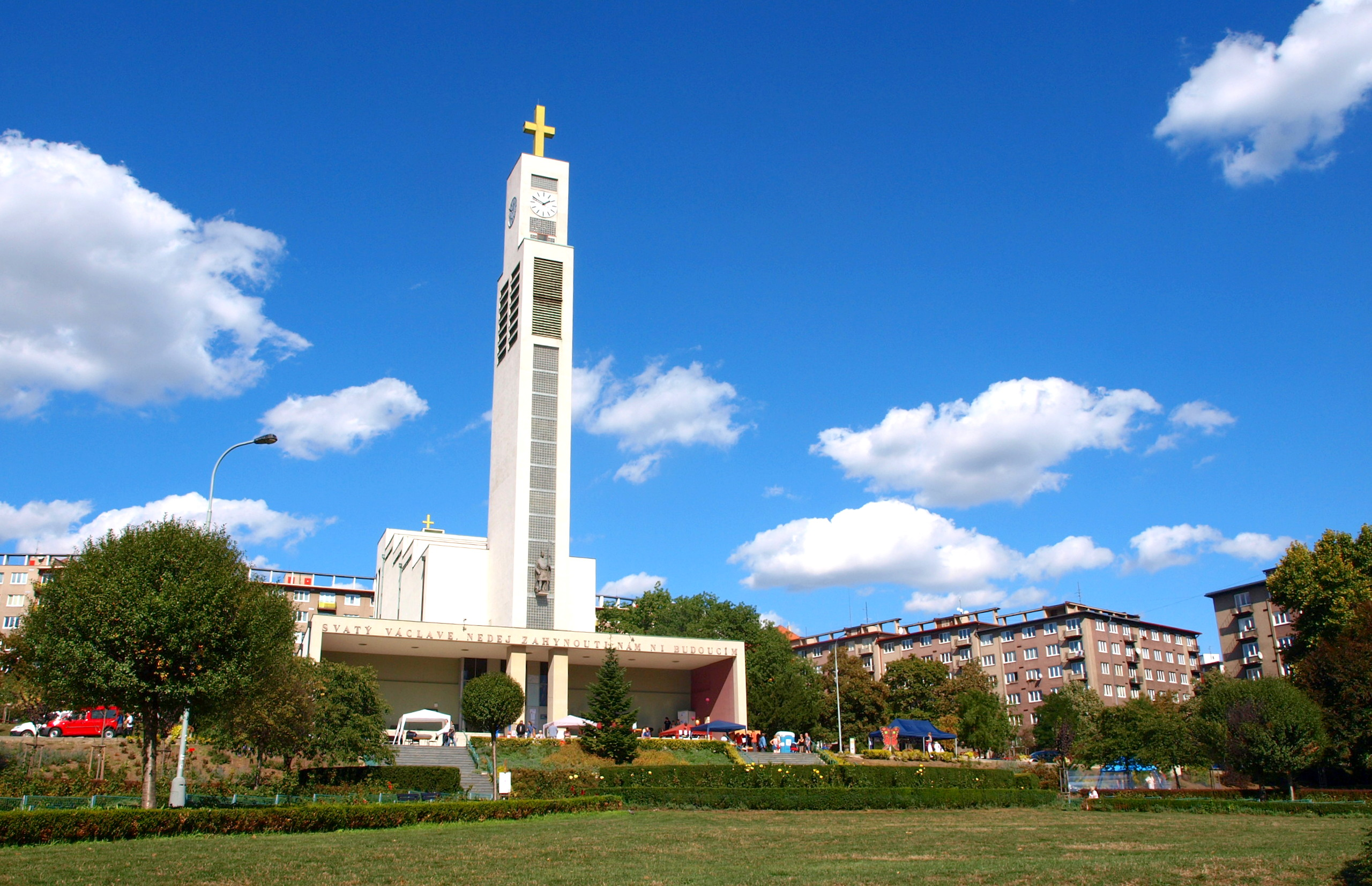 Náměstí Svatopluka Čecha